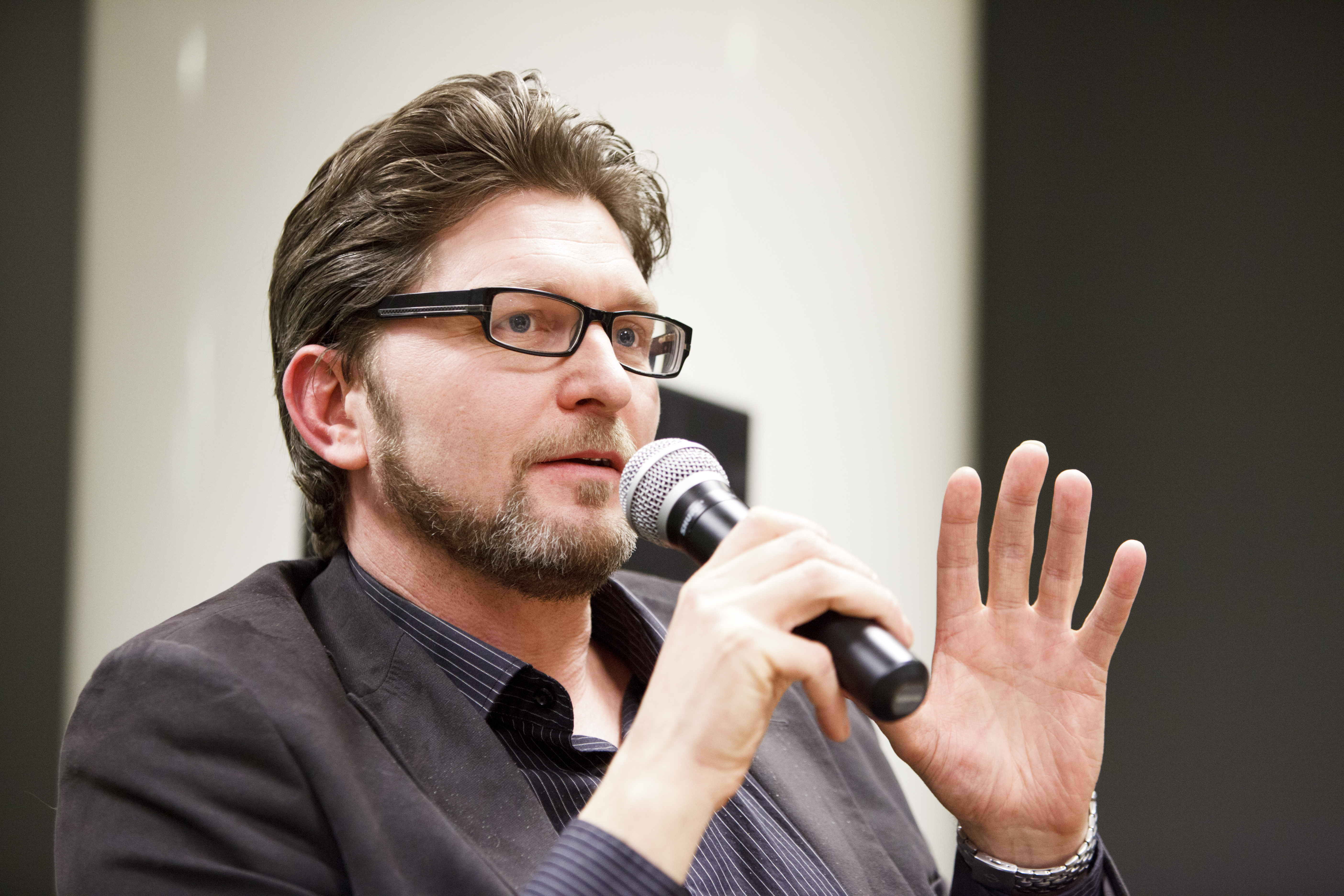 Bergsveinn Birgisson fra Island, nomineret til Nordisk Råds litteraturpris 2012 til litteraturarrangement hos Kulturkontakt Nord i Finland.